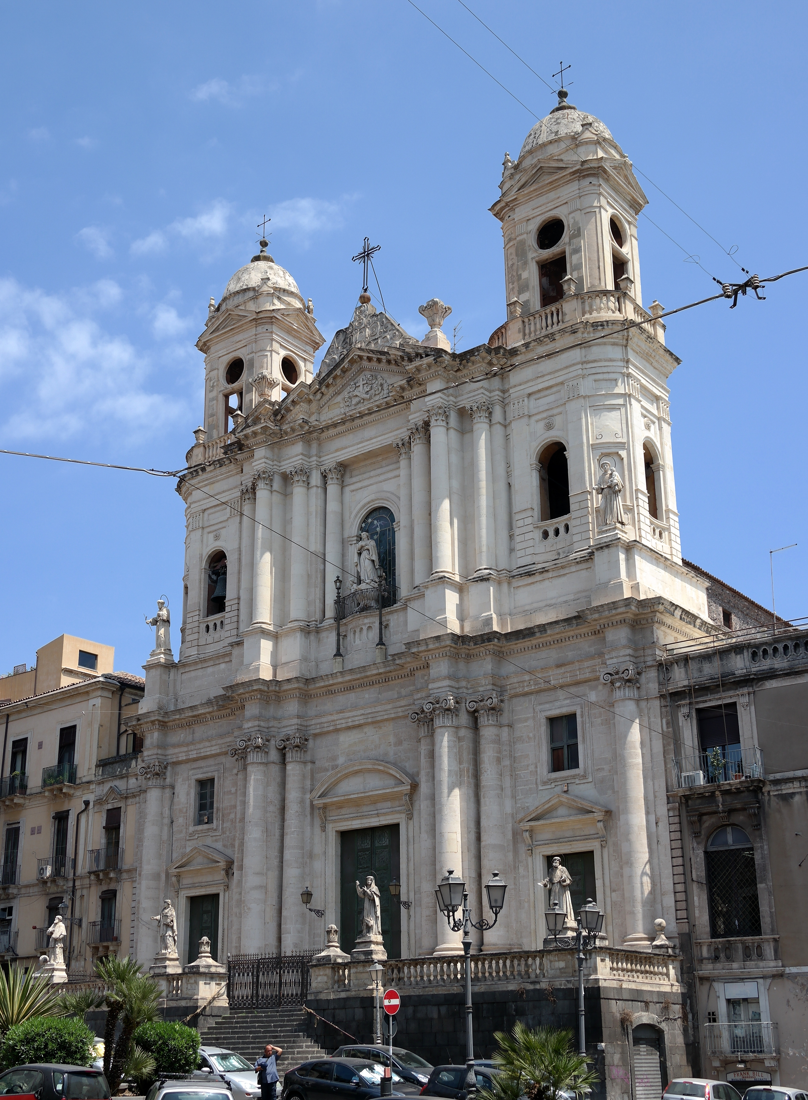 Chiesa di San Francesco d'Assisi all'Immacolata a Catania